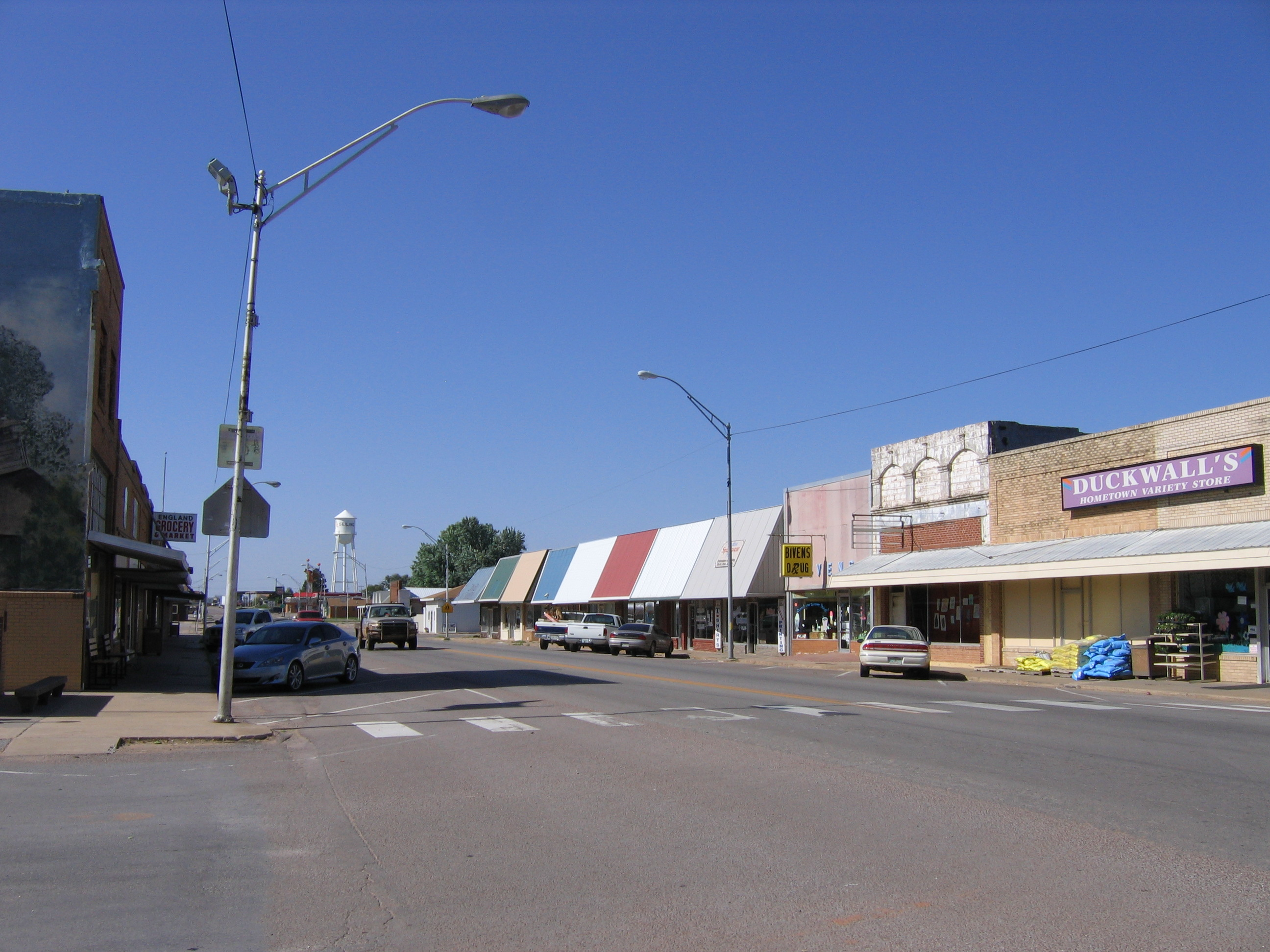 Seiling, Oklahoma